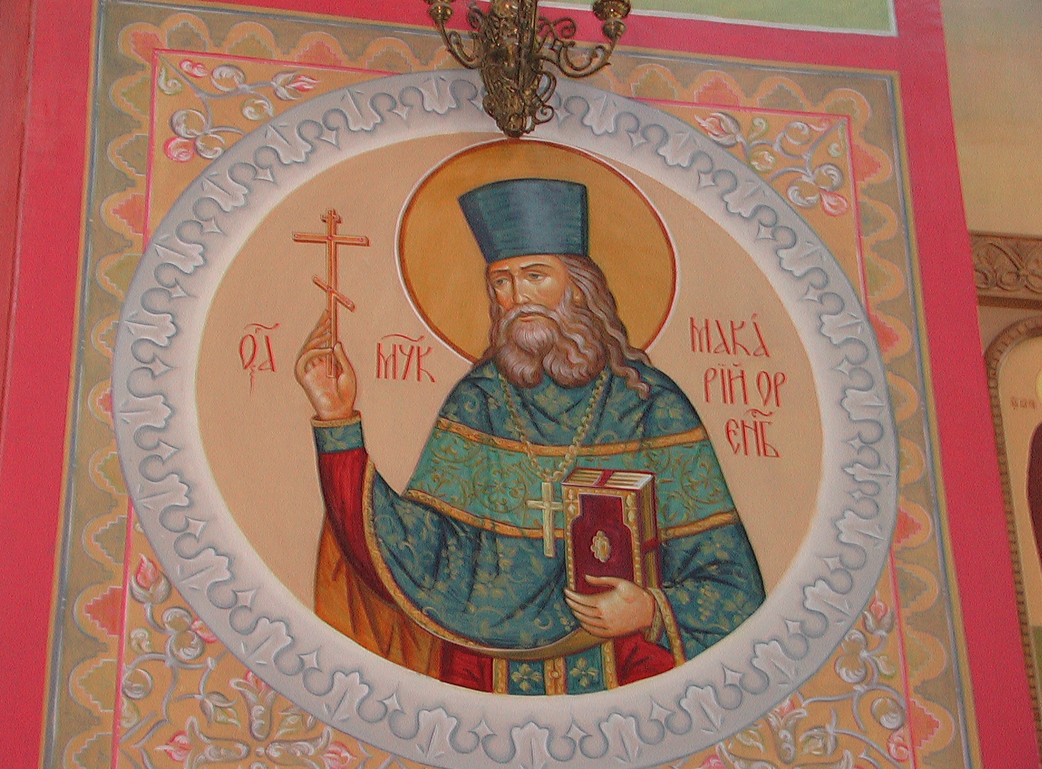 Фреска Макария Оренбургского в Свято-Троицкой Симеоновой Обители Милосердия в Саракташе